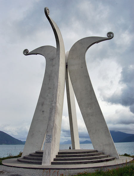 Denkmal zur Erinnerung an die Schlacht von Hjørungavåg im Jahr 986. Das Denkmal wurde am 14. August 1986 durch König Olav V. eingeweiht.